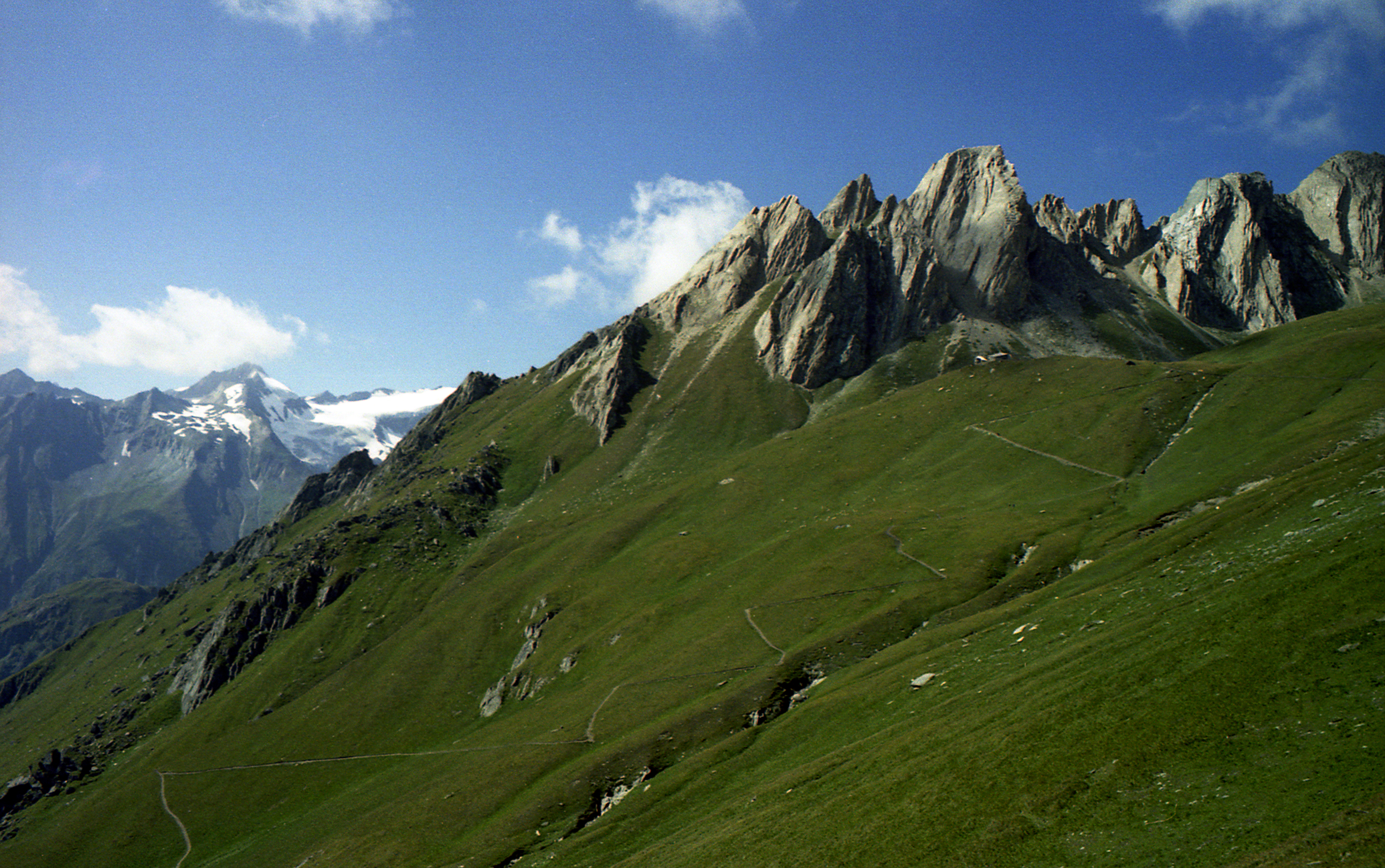 Alte Sajathütte, Blick über den Sajatmähder zur Roten Säule